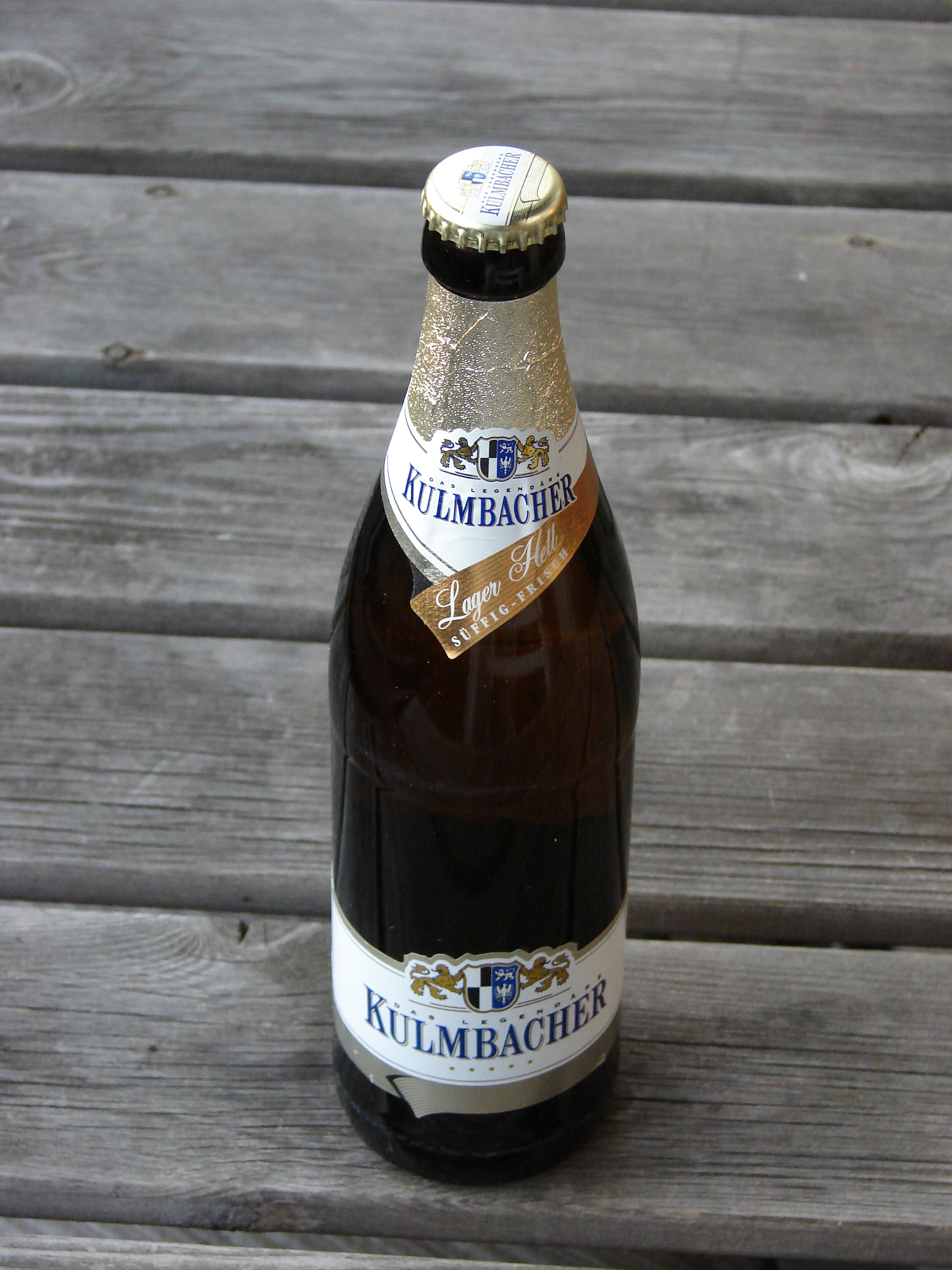 Botella de cerveza Lager Hell, de la marca Kulmbacher